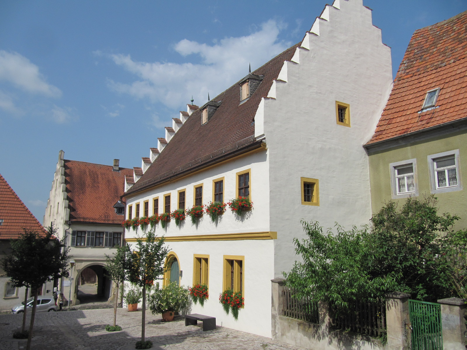 Blick auf den Rathausplatz und zur Goldenen Krone von der Kirche aus